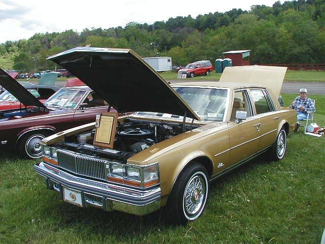 1977 Cadillac Seville19 77 Cadillac Seville